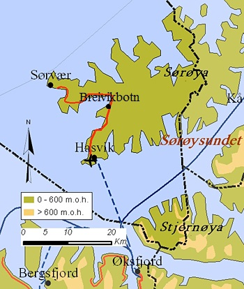 Hasvik map with Breivikbotn